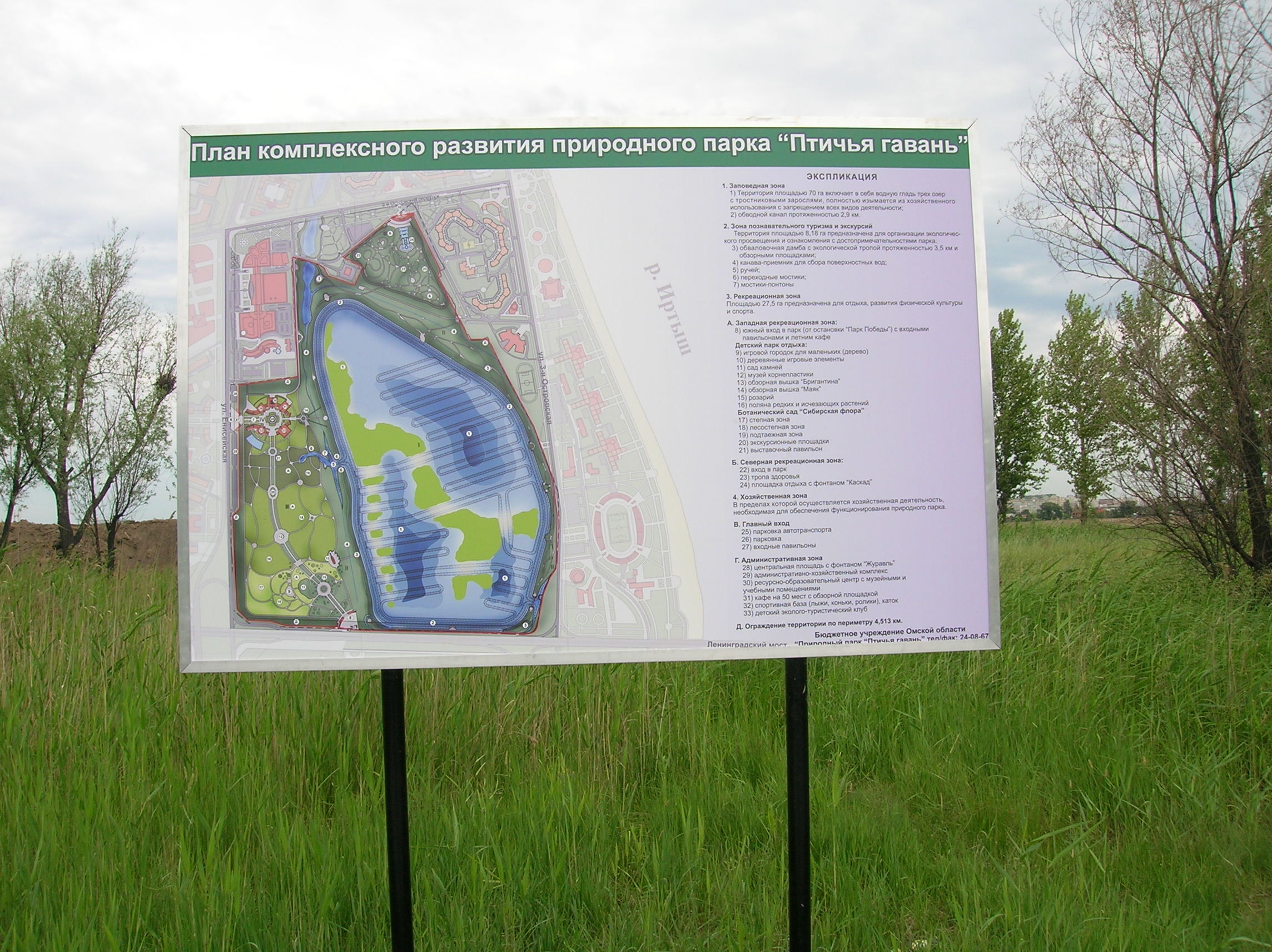 Природный парк «Птичья гавань» летом.